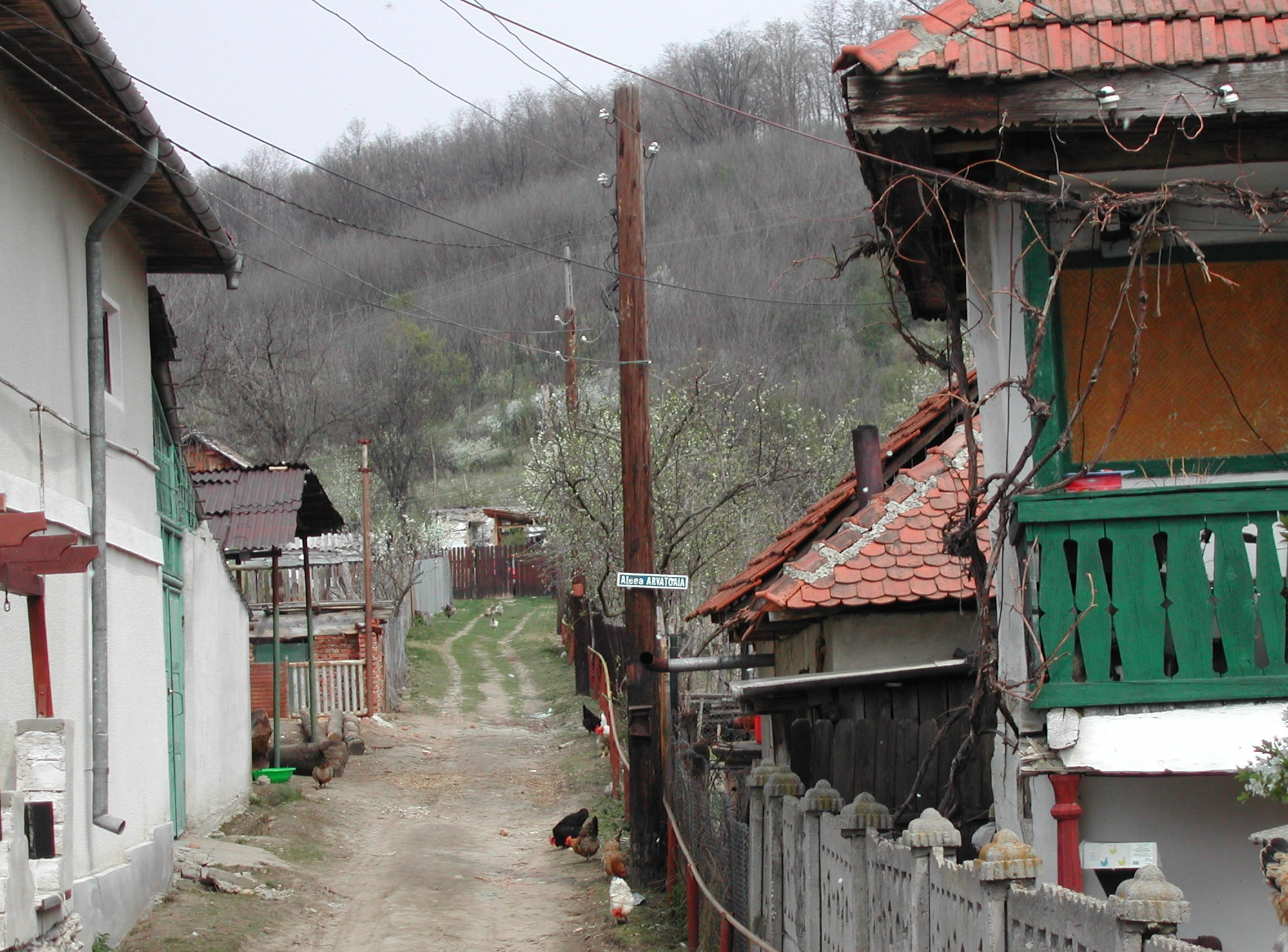 Țicleni Région de Județul Gorj.- România.